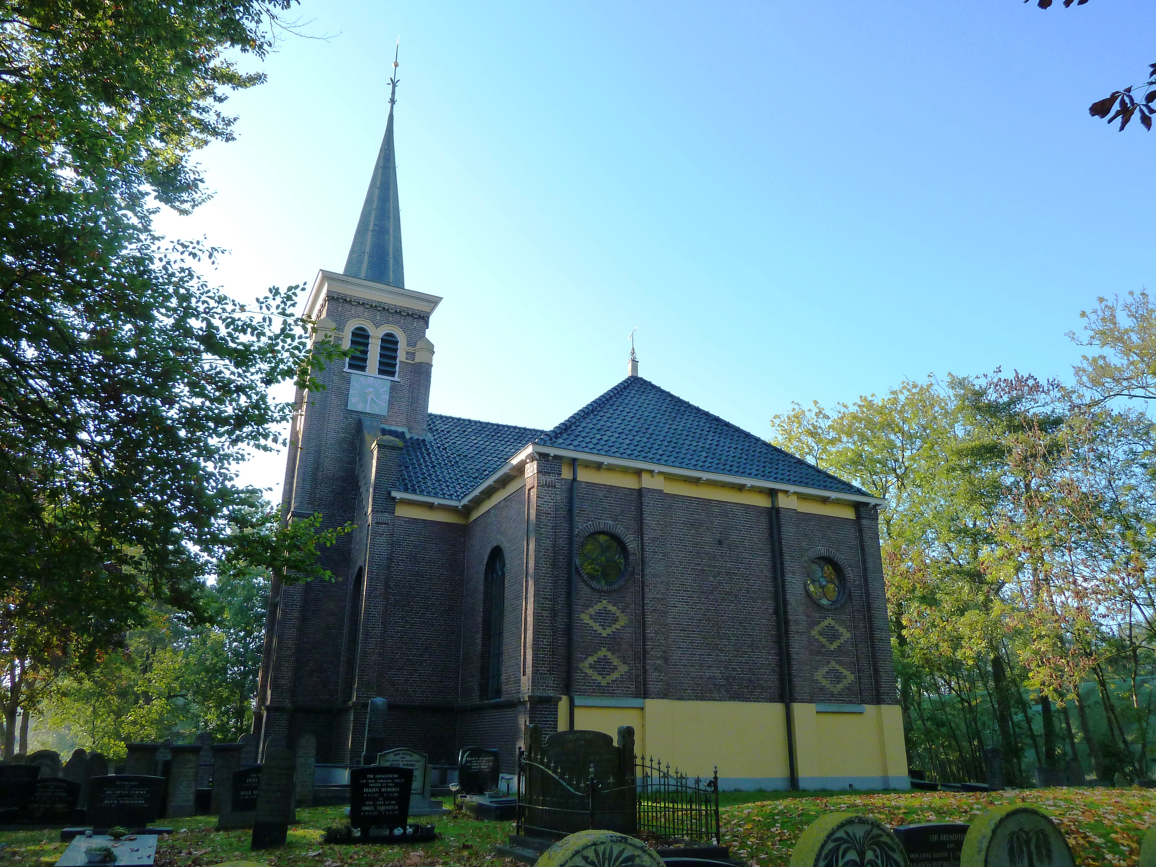 Hervormde kerk van Lutjegast (Groningen, Nederland)